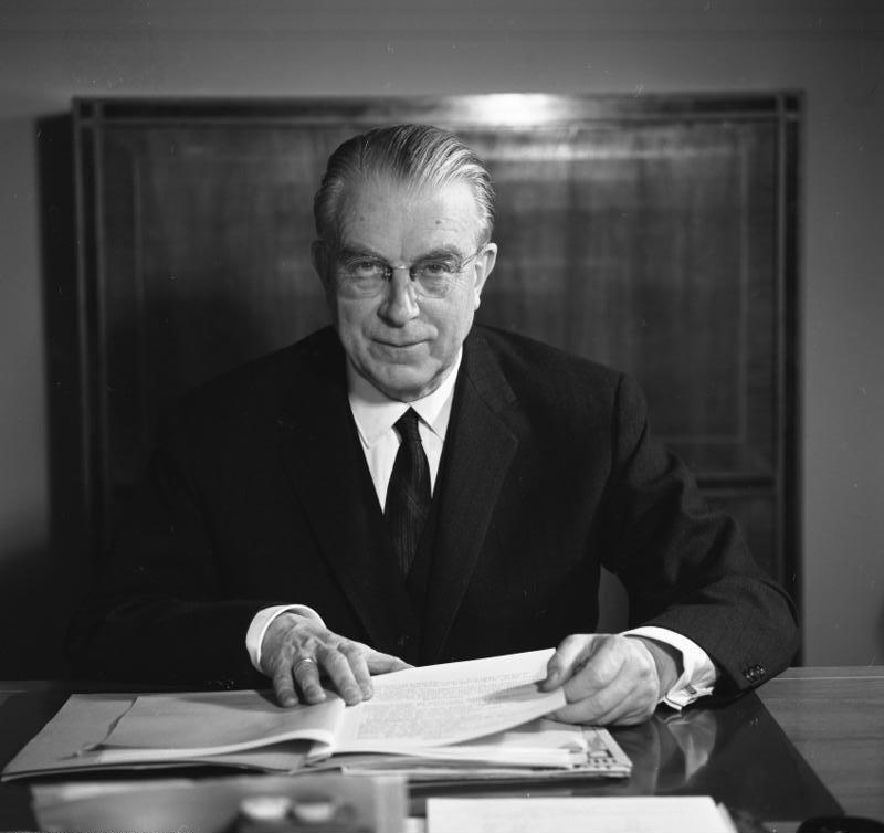 Portraitaufnahmen von Staatssekretär Globke